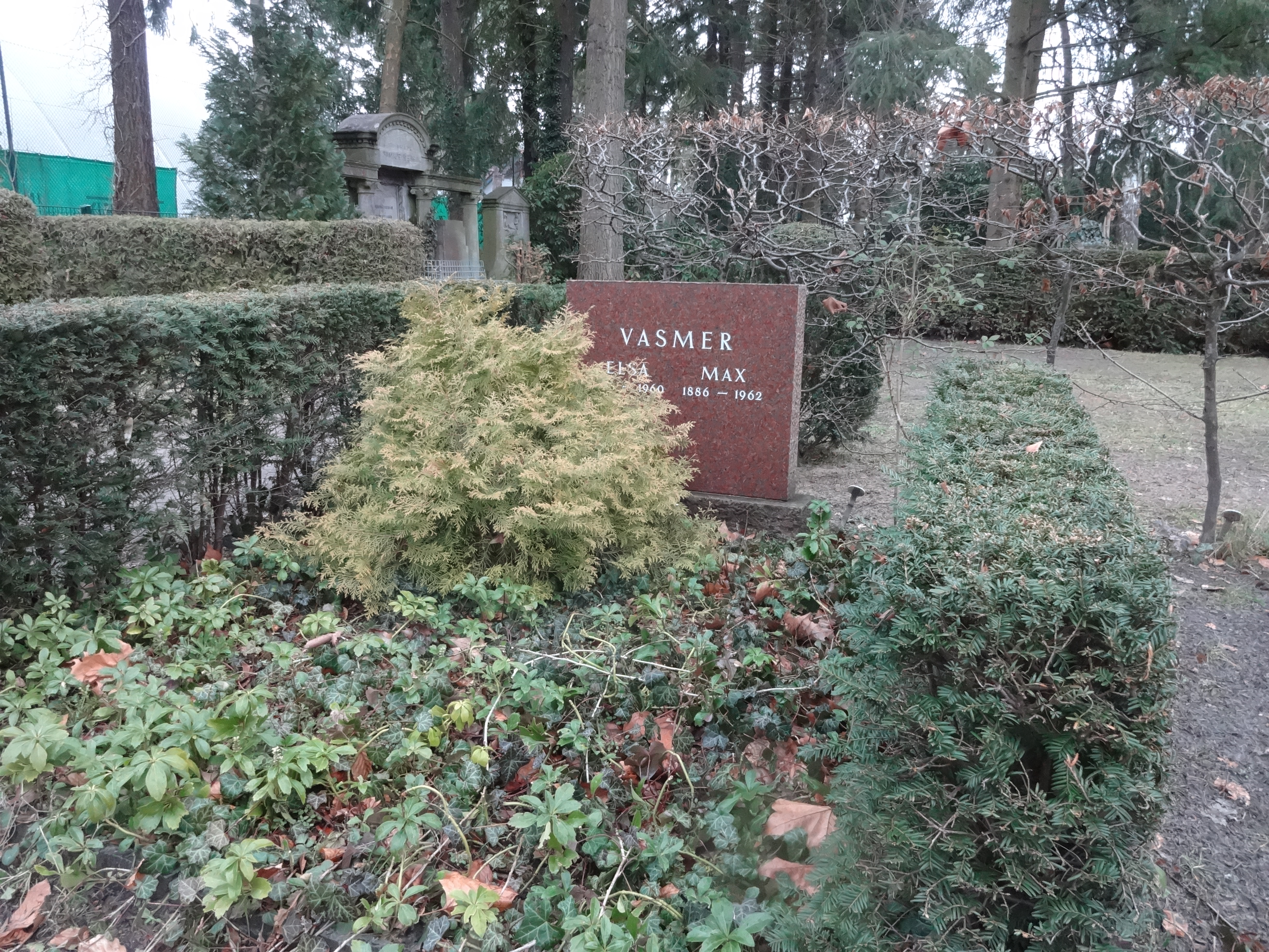 Grab von Max Vasmer auf dem Evangelischen Kirchhof Nikolassee in Berlin (ehemaliges Ehrengrab)